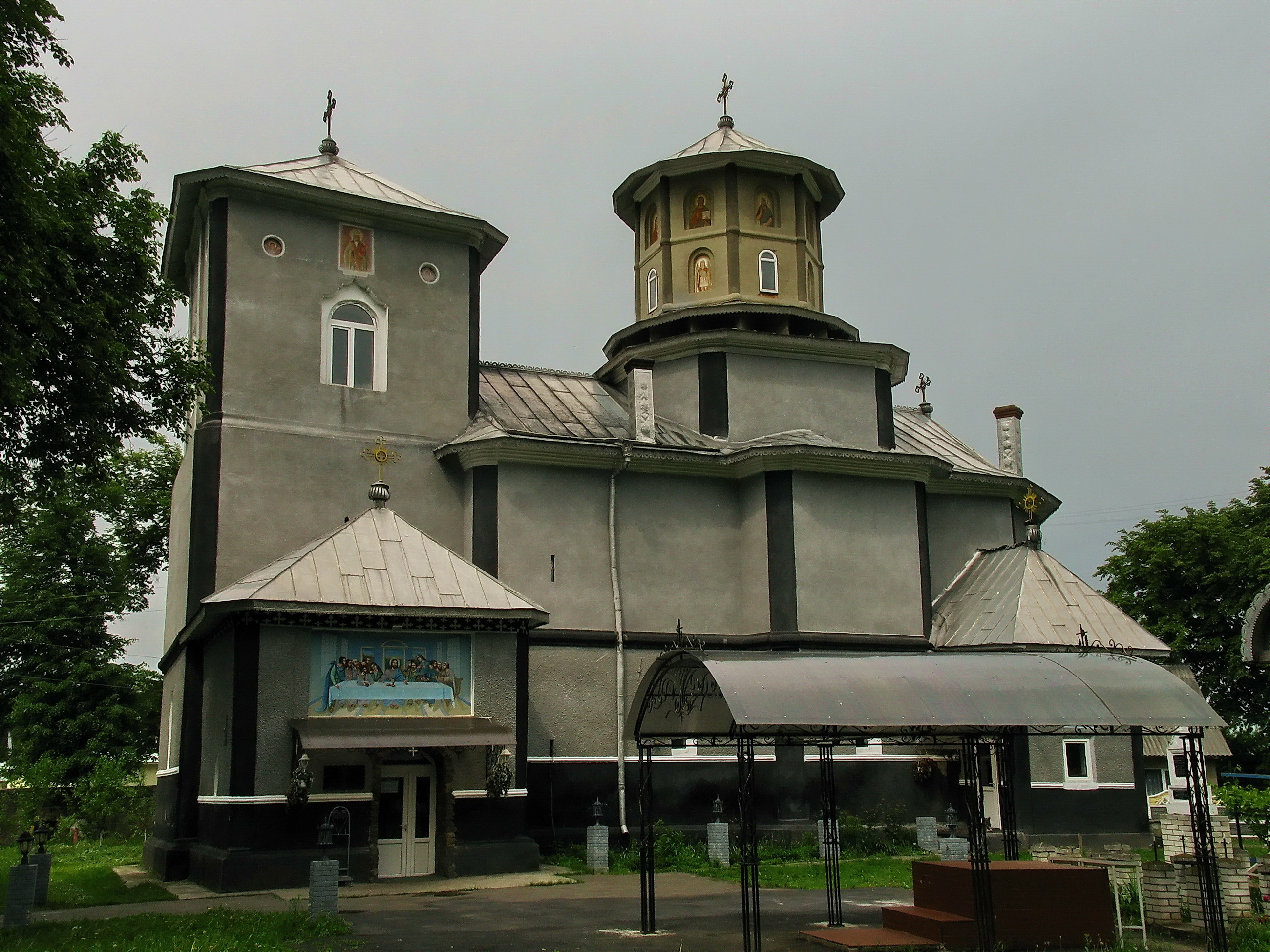 Biserica „Sfântul Spiridon” din Herța, regiunea Cernăuți, Ucraina